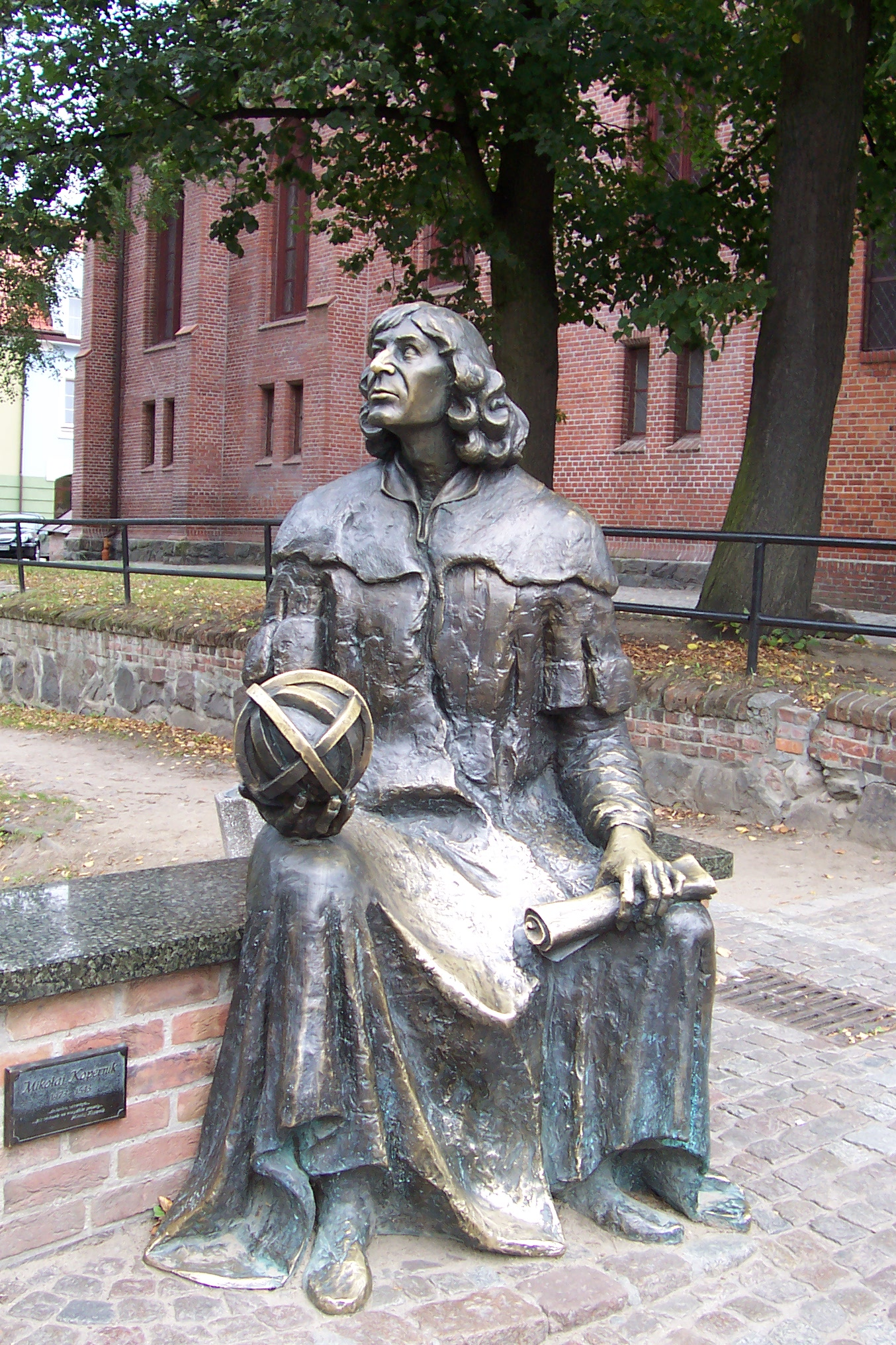 Bronzeplastik für Nikolaus Kopernikus am Eingang zum Schloß von Allenstein (Olsztyn)